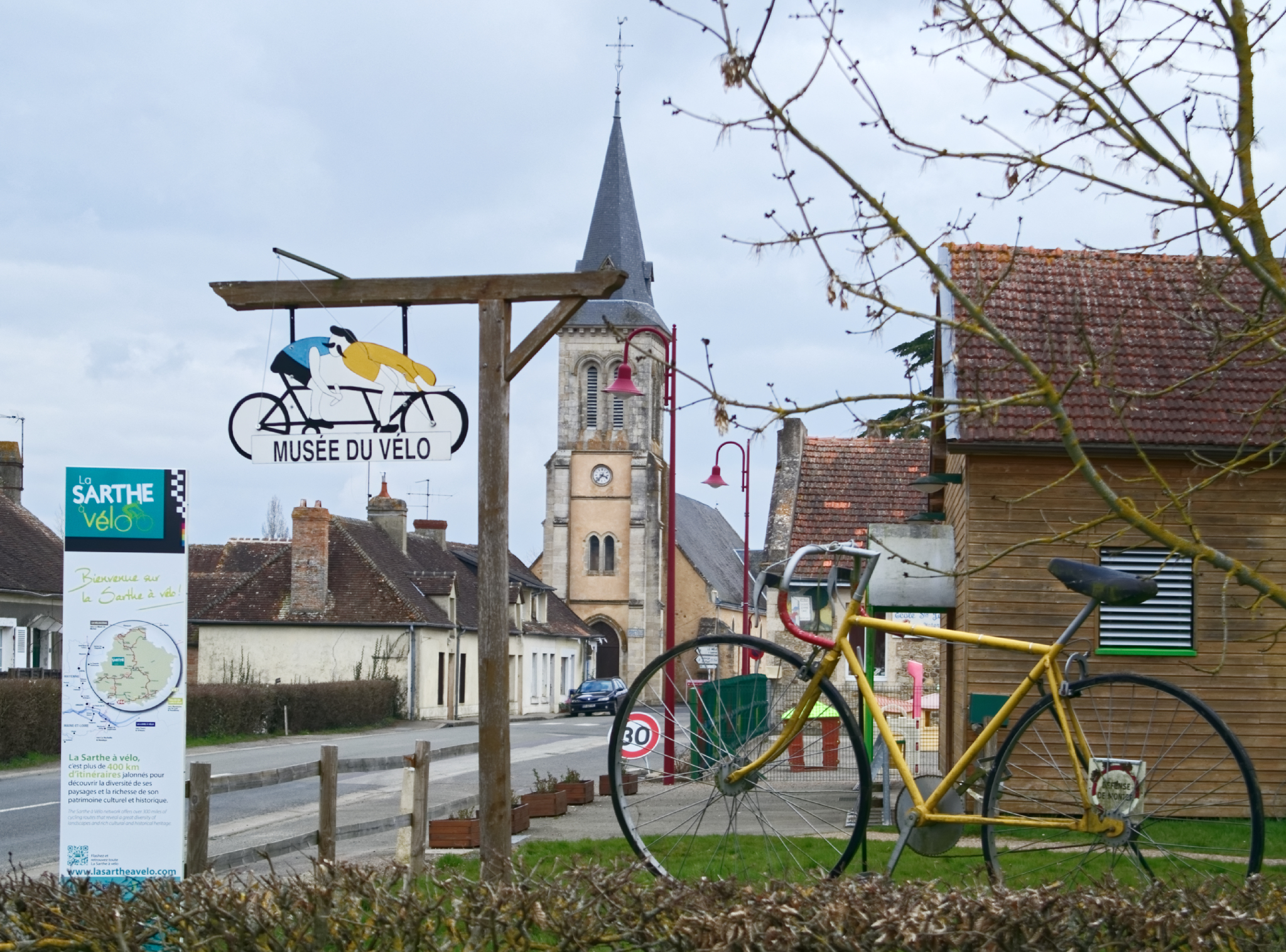 La Fresnaye-sur-Chédouet; Villeneuve-en-Perseigne; Sarthe; France; église; musée du vélo